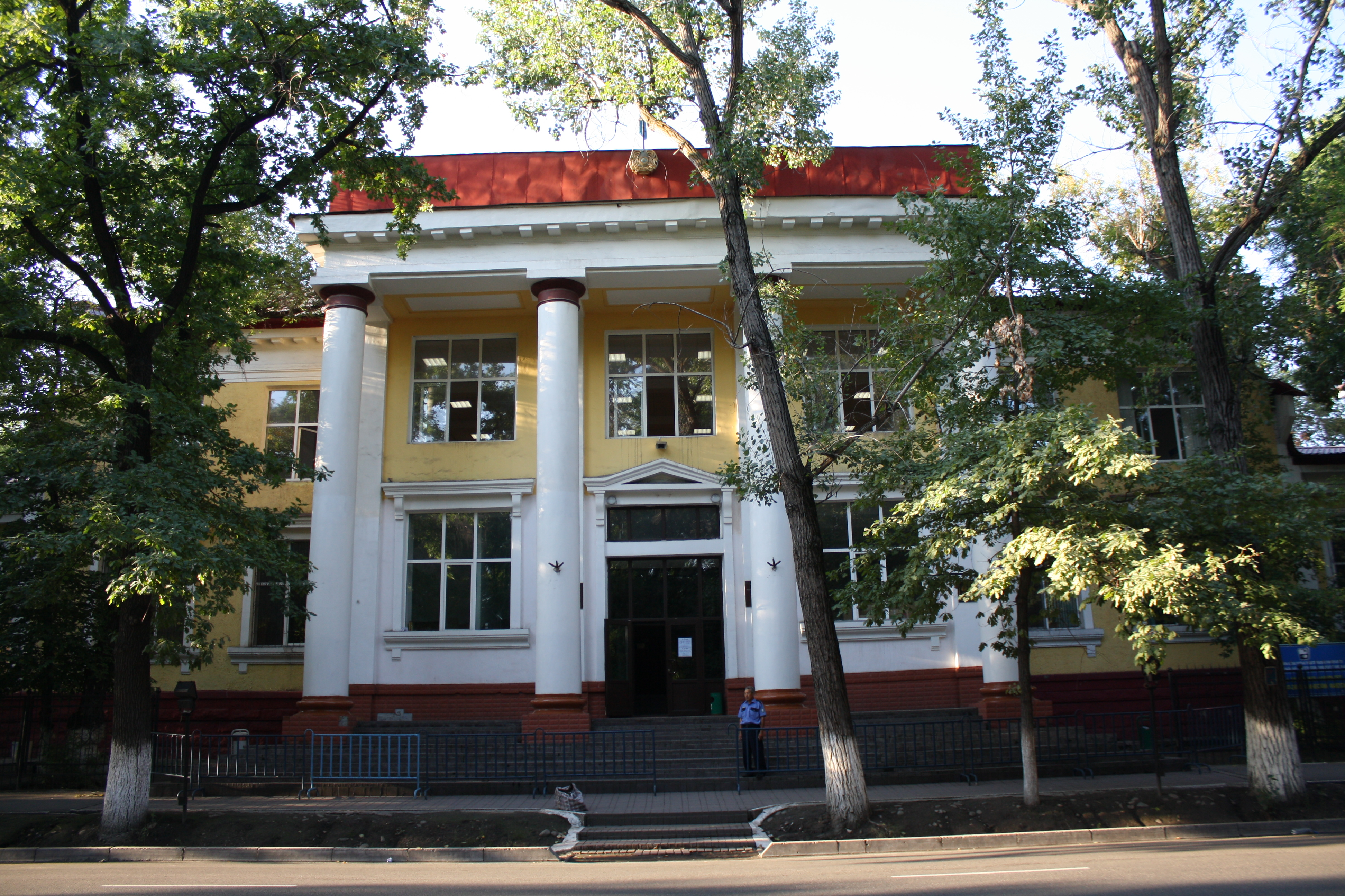 Казахстан, Алма-Ата. Корпус Казахского национального педагогического университета (бывшая Верненская мужская гимназия)